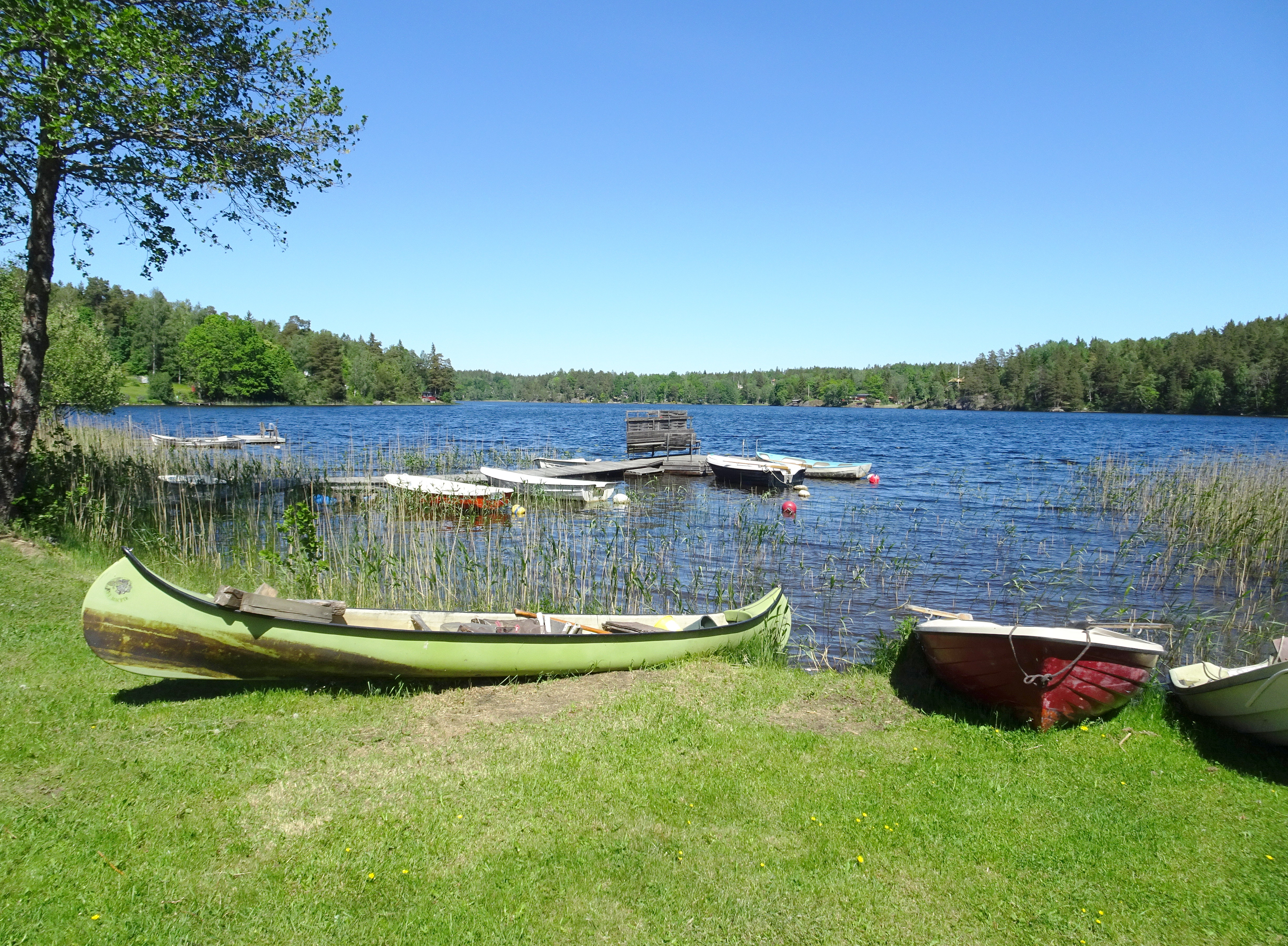 Sjön Ådran, Huddinge